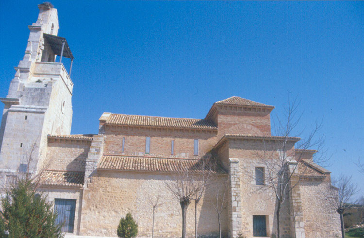 Iglesia de San Cipriano - San Cebrián de Mazote (Valladolid) - Diapositiva 48 x 48 Color